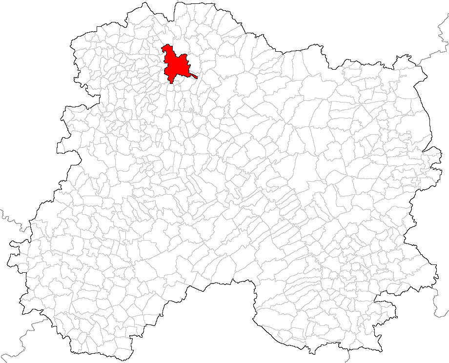 Carte des communes de la Marne avec Reims en rouge.